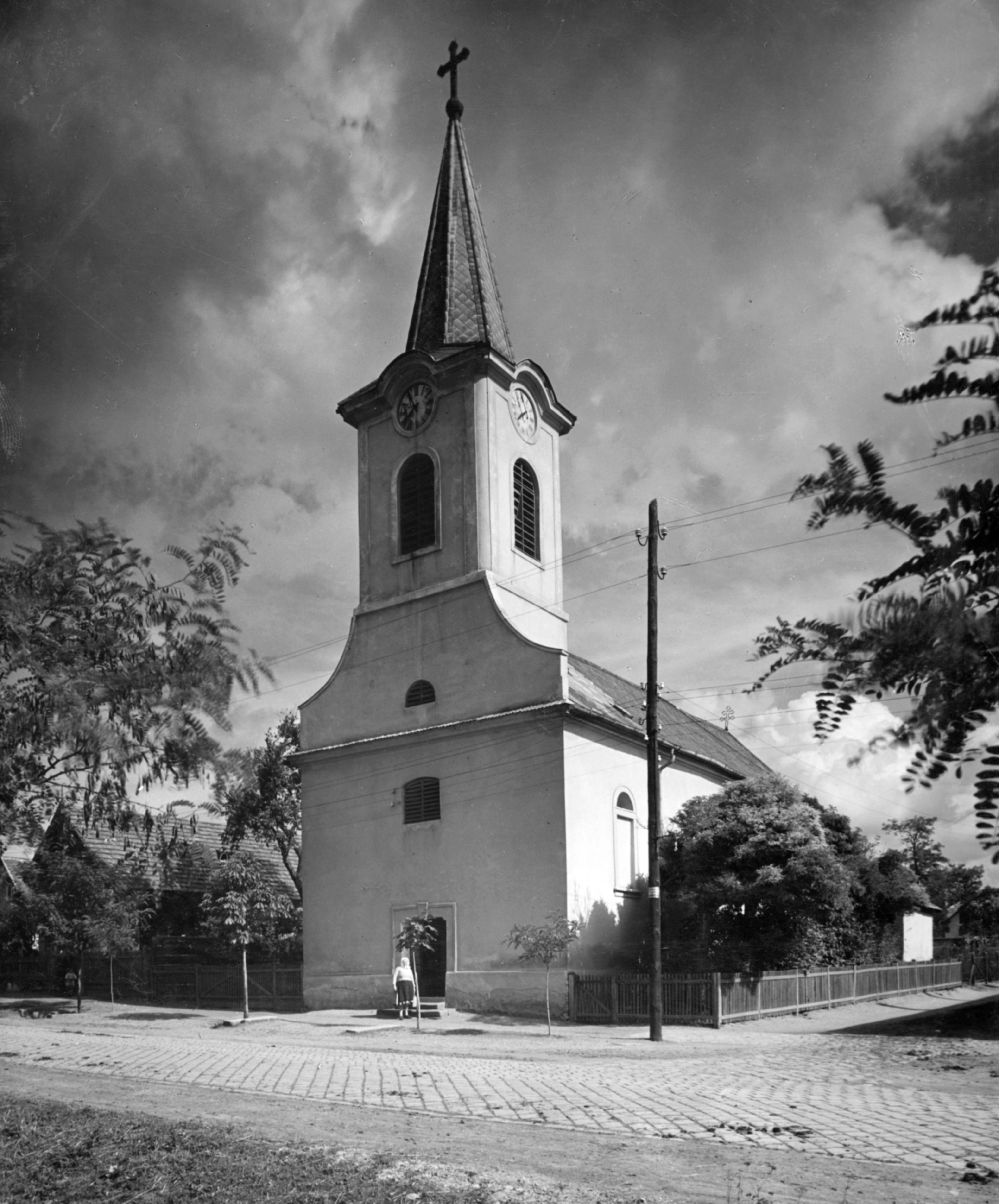 Batthyány Ilona utca 21. Szent Mária Magdolna plébániatemplom. Location: Hungary, Budapest XVI. Cinkota? Tags: church, street view, Budapest Title: Batthyány Ilona utca 21. Szent Mária Magdolna plébániatemplom.